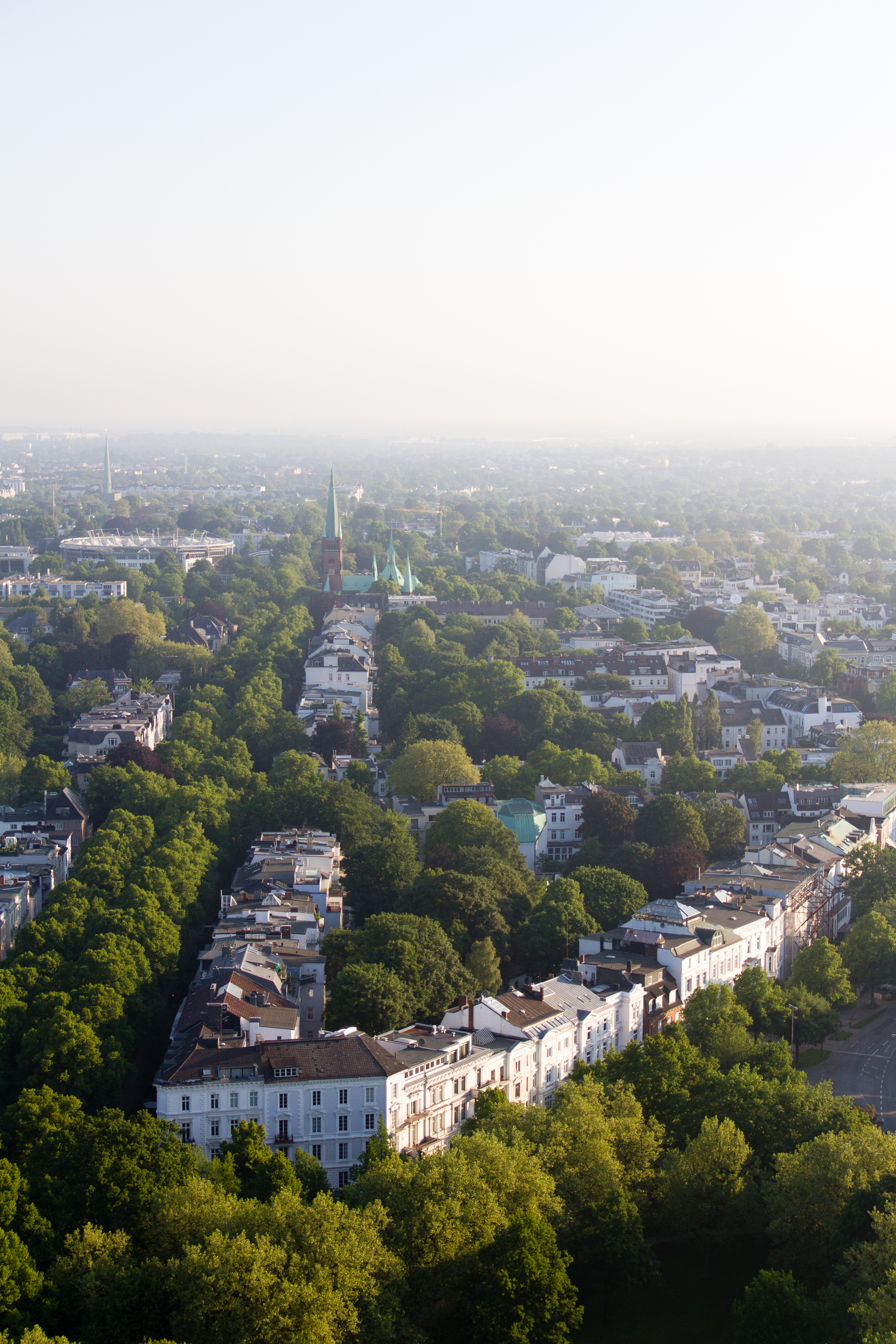 Heimhuderstraße in Hamburg-Rotherbaum